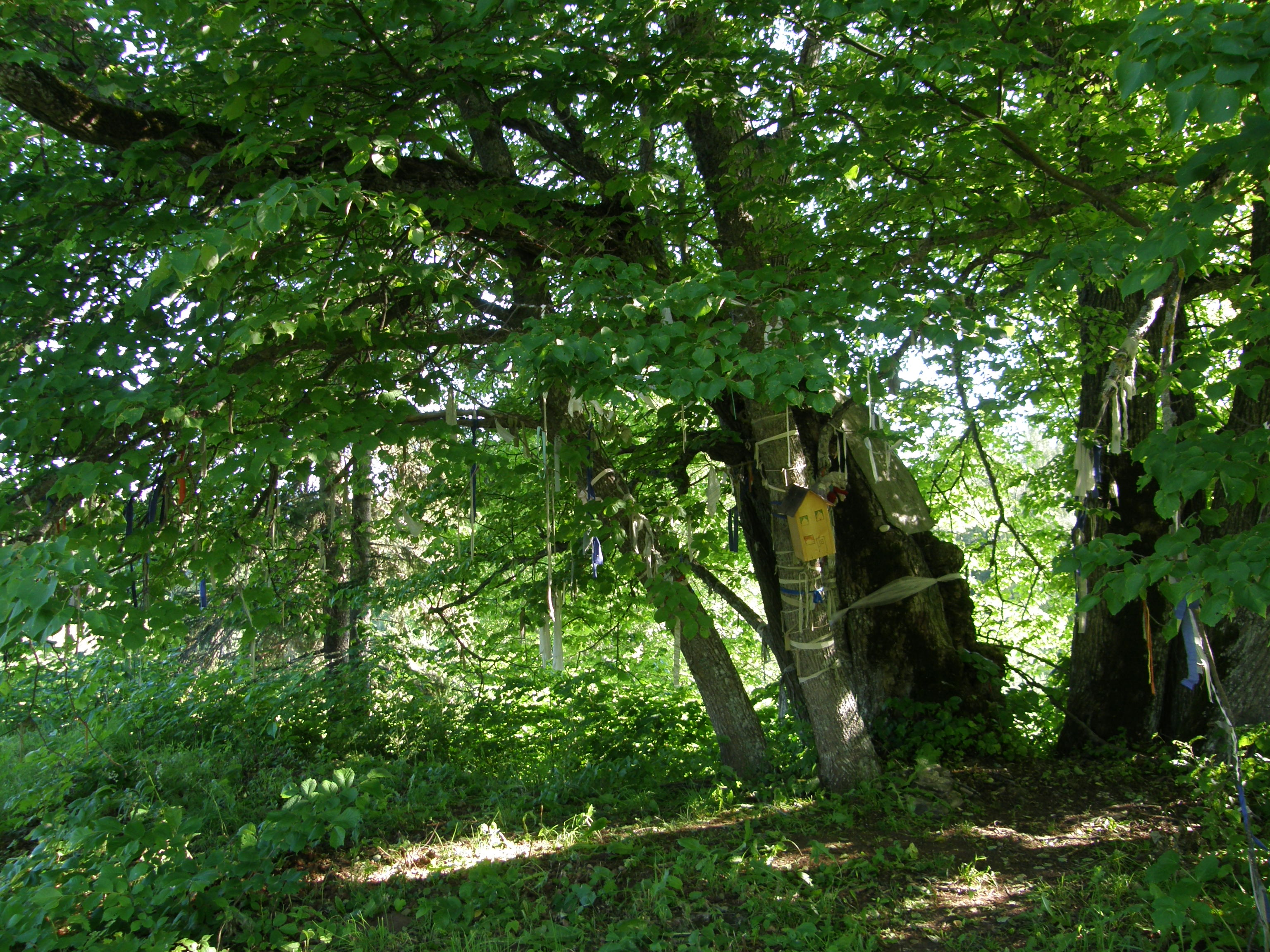 Ilumäe hiieniinepuu Ilumäel